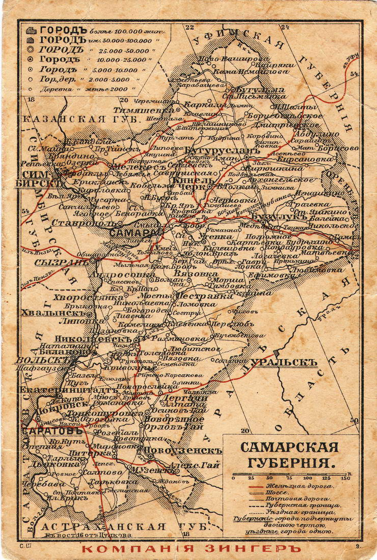 Карта Самарской губернии от 1906 года.